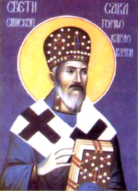 Sveti sveštenomučenik Sava Gornjokarlovački